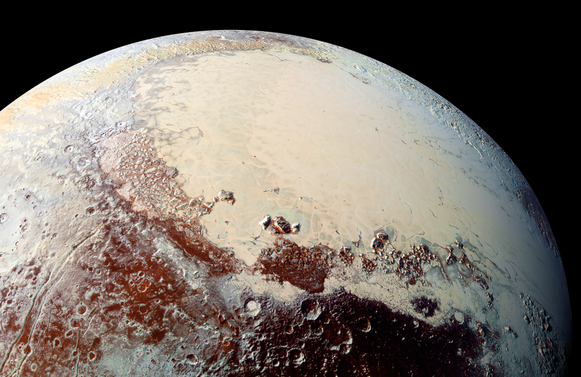 This high-resolution image captured by NASA’s New Horizons spacecraft combines blue, red and infrared images taken by the Ralph/Multispectral Visual Imaging Camera (MVIC). The bright expanse is the western lobe of the “heart,” informally called Sputnik Planum, which has been found to be rich in nitrogen, carbon monoxide and methane ices.